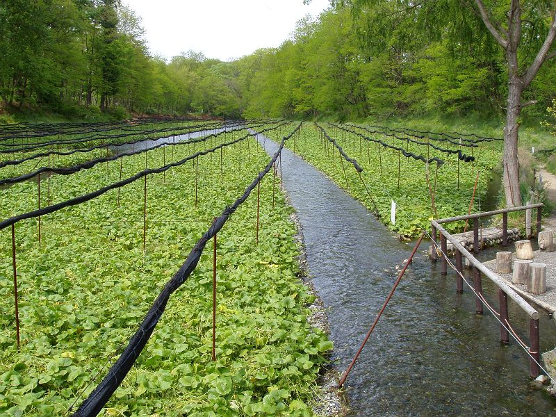 安曇野 山葵田